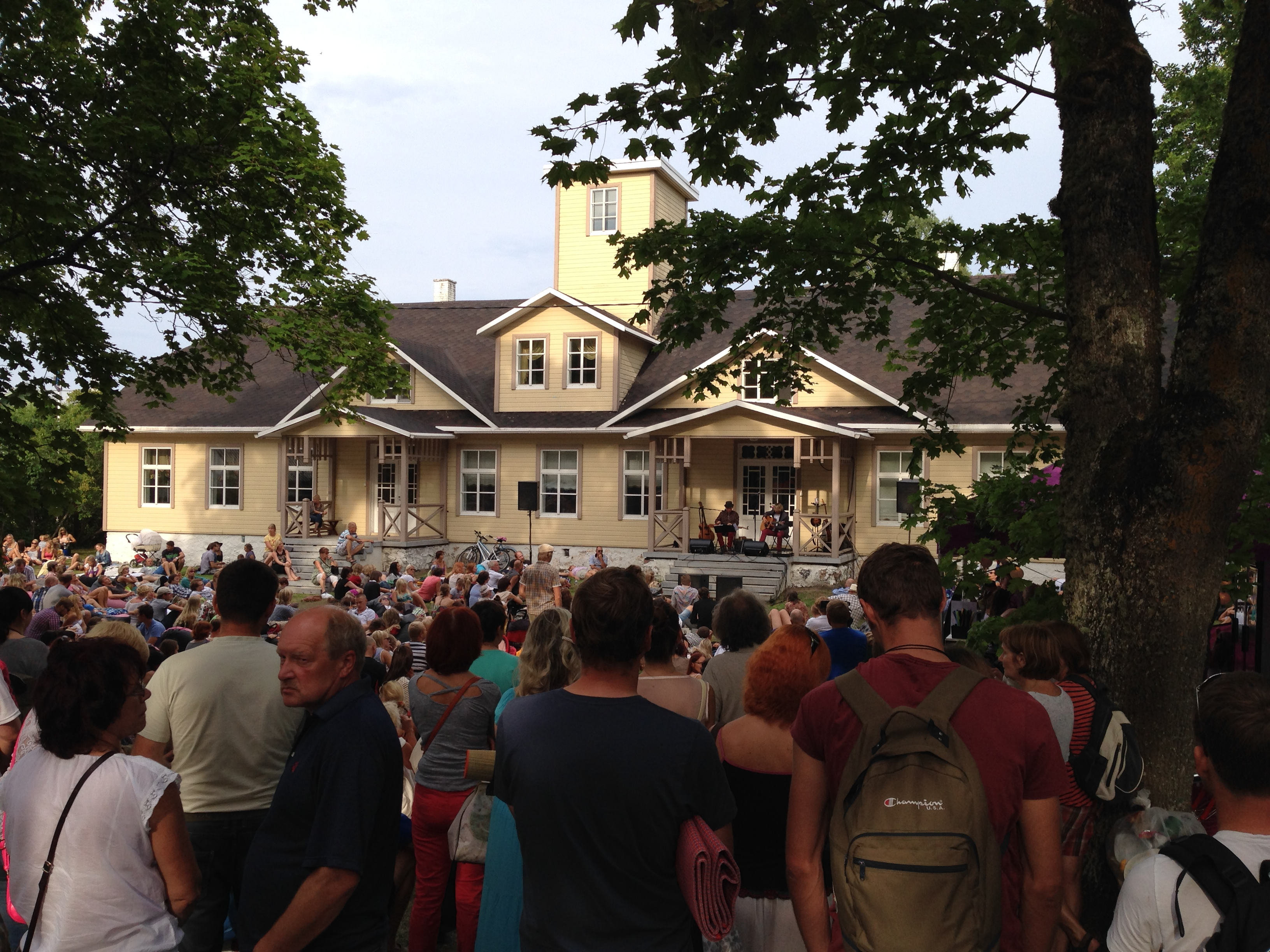 Viru Folk Käsmu merekooli juures